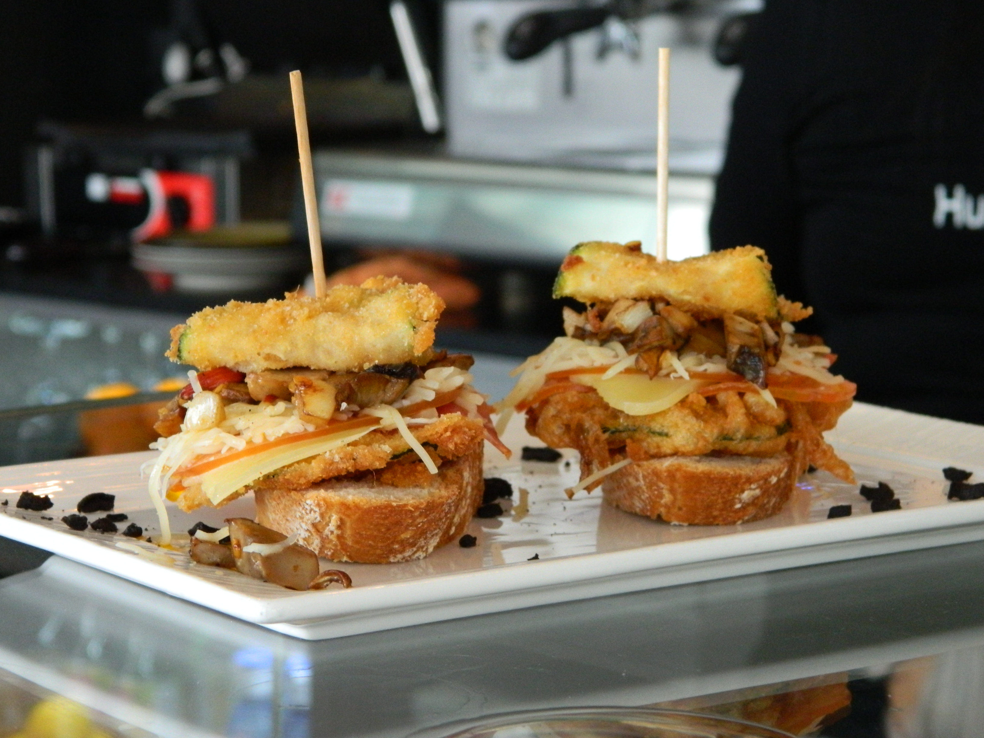 Pincho en un bar de Vitoria-Gasteiz, Álava, País Vasco, España